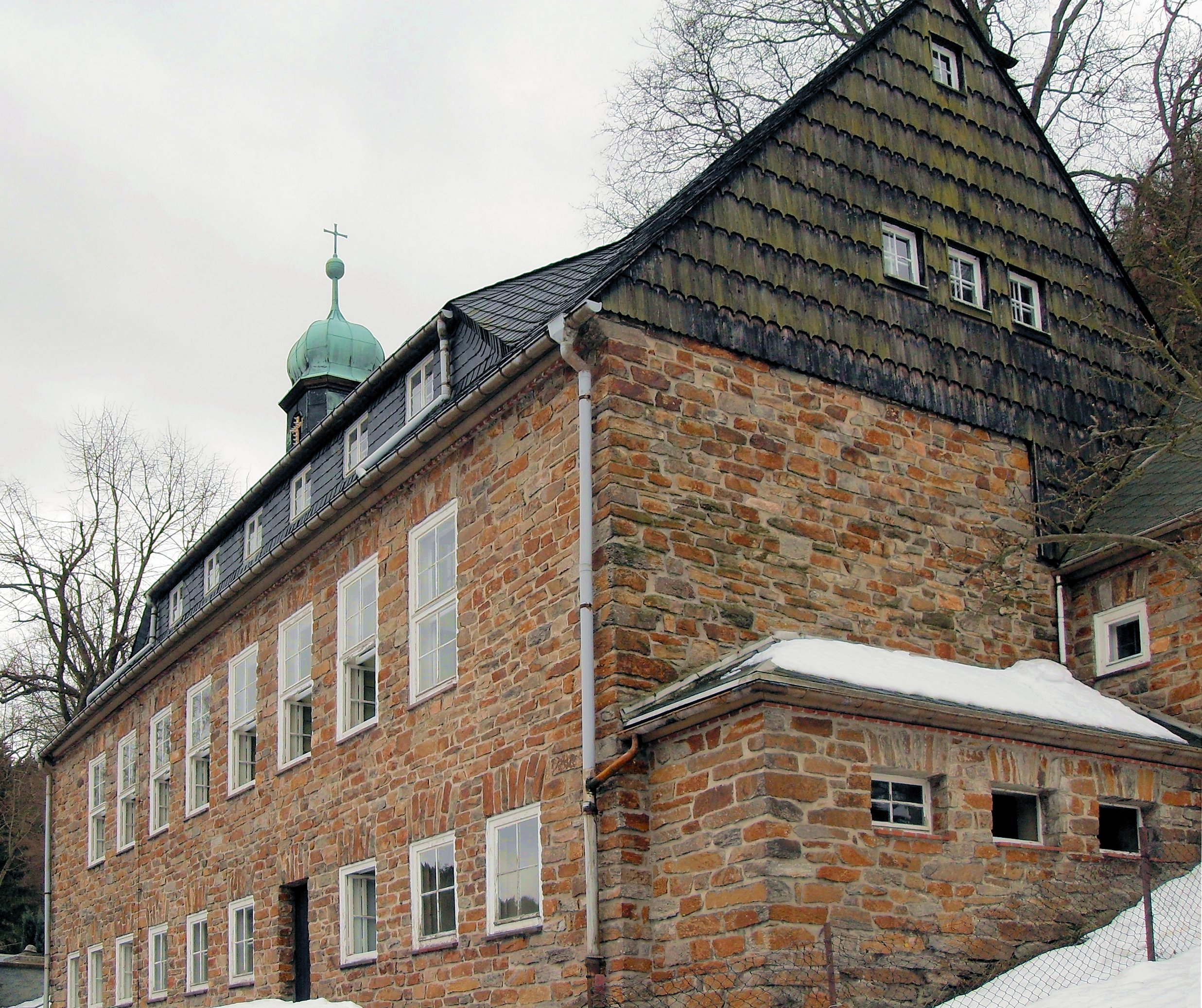 Stephanuskapelle in Rothenthal, Stadt Olbernhau, Erzgebirgskreis, Deutschland